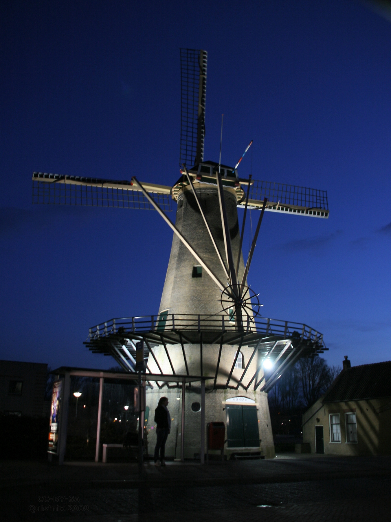 Rozenburg (ZH): Molen De Hoop bij nacht